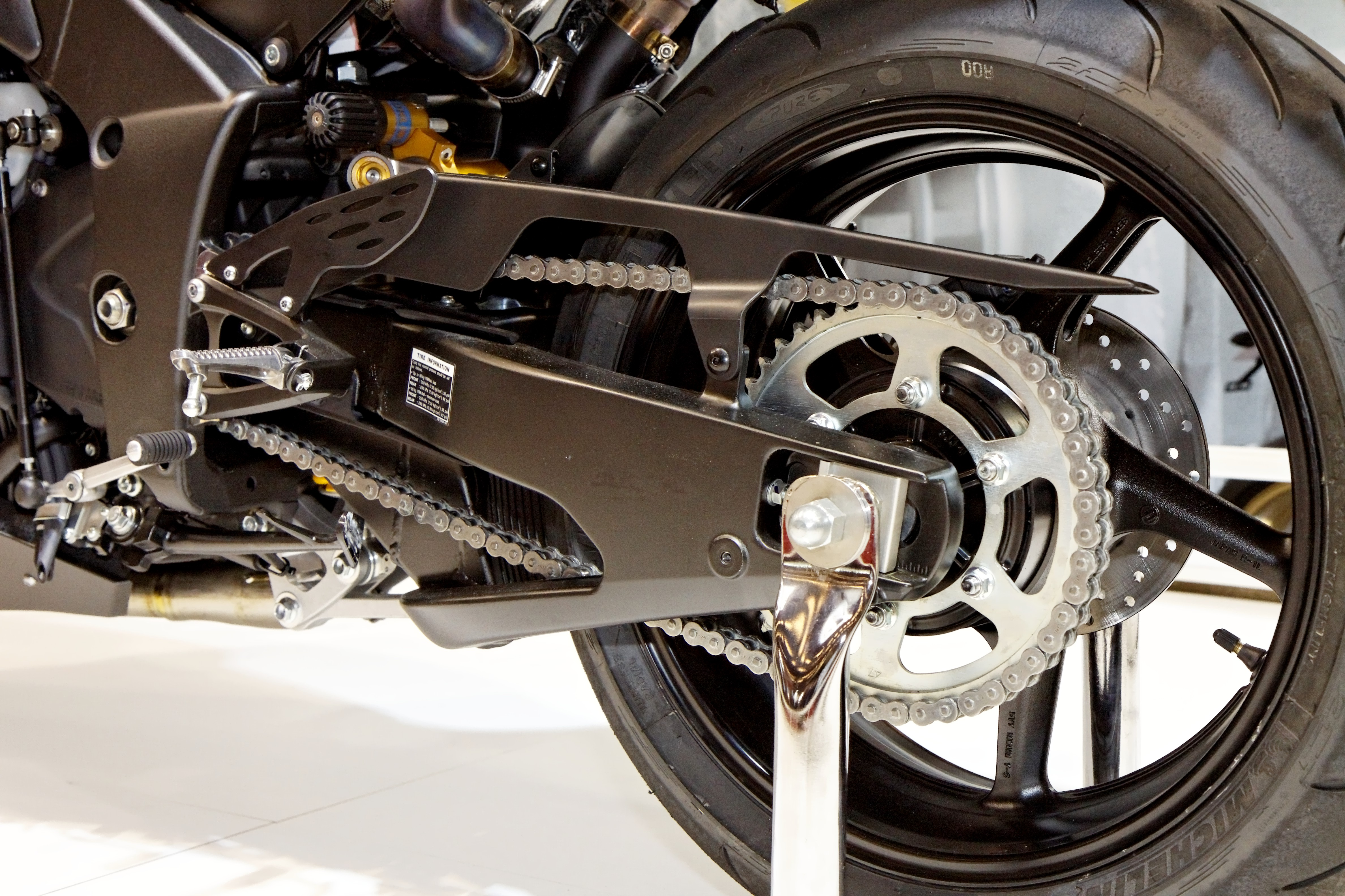 Une moto Yamaha au salon de la moto, Paris, porte de Versailles.